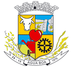 Brasão_Água_Boa_MT.gif